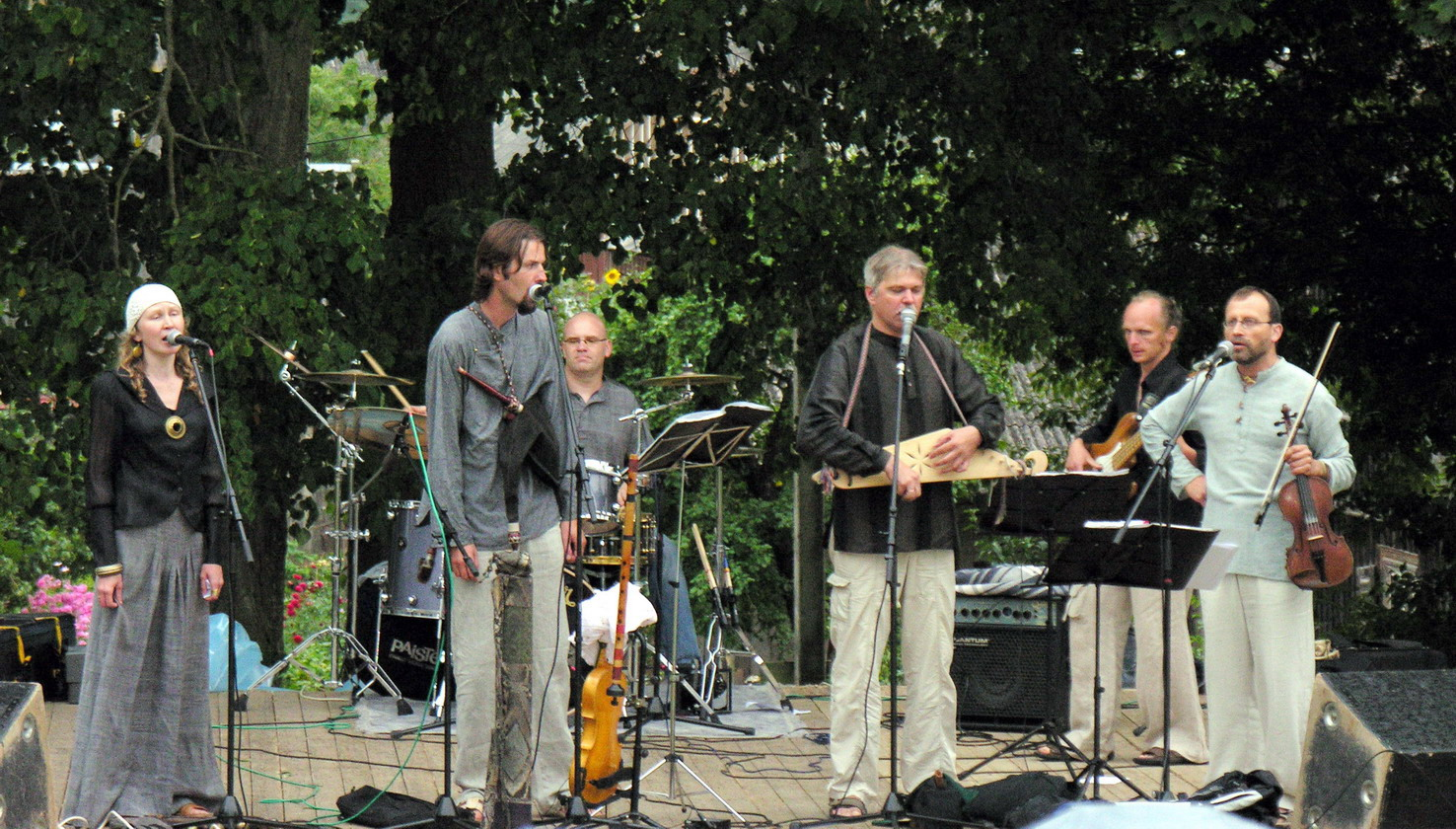 2008 m. rugpjūčio 15 d. koncerto Viekšniuose metu